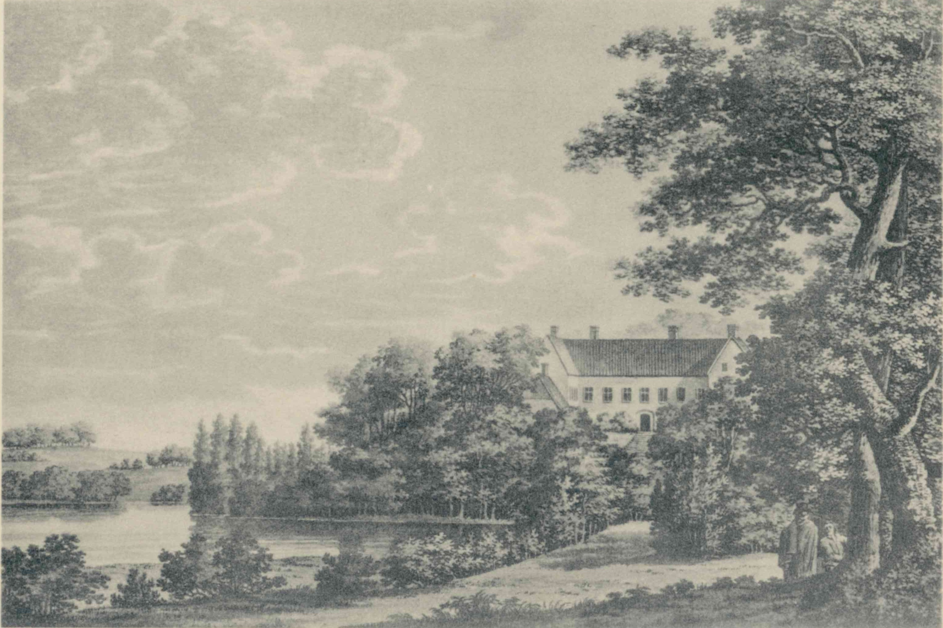 Näsbyholm